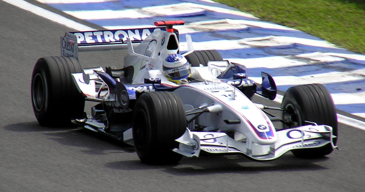 Formula One 2006 Rd.18 Interlagos: #16 Nick Heidfeld (BMW Sauber)